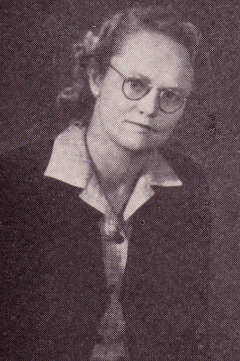 Tryna du Toit.